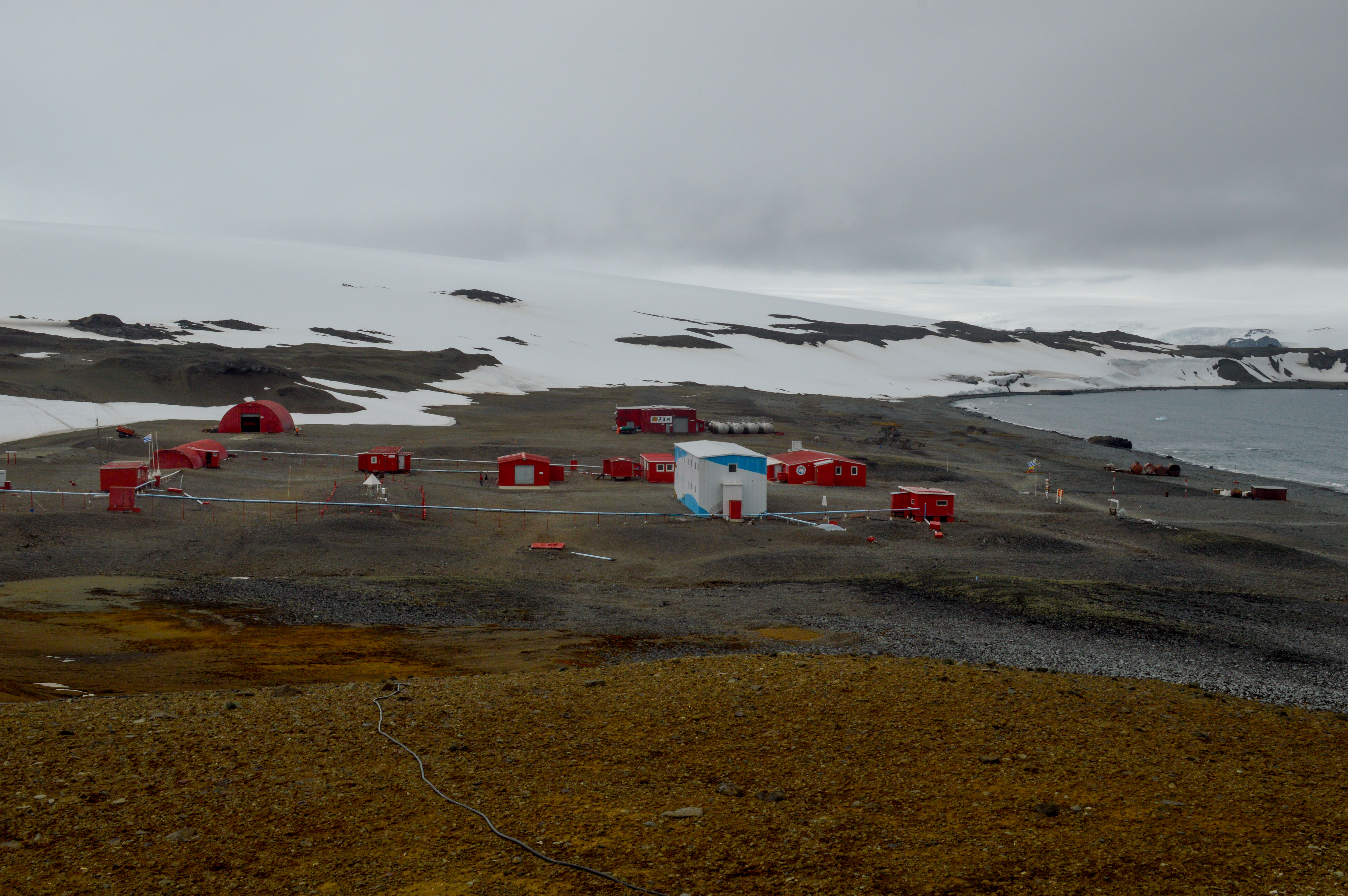 Fotografía tomada por estudiante de la tercera edición de la EVIIA (Ary Mailhos) de la Base Científica Antártica Artigas, Península Fildes, Isla Rey Jorge en las islas Shetland del Sur.